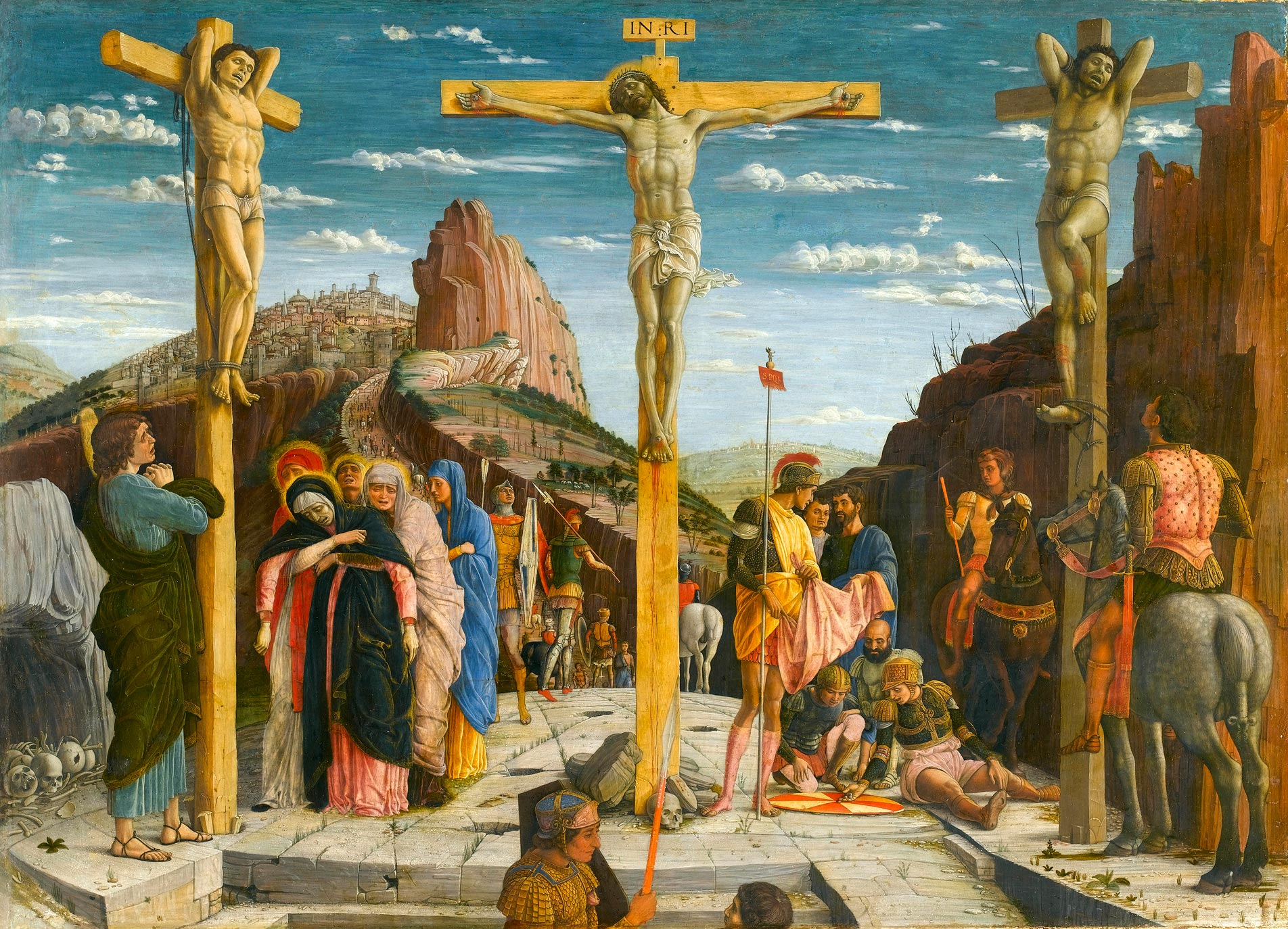 Altarretabel von San Zeno in Verona, Triptychon, mittlere Predellatafel: Kreuzigung